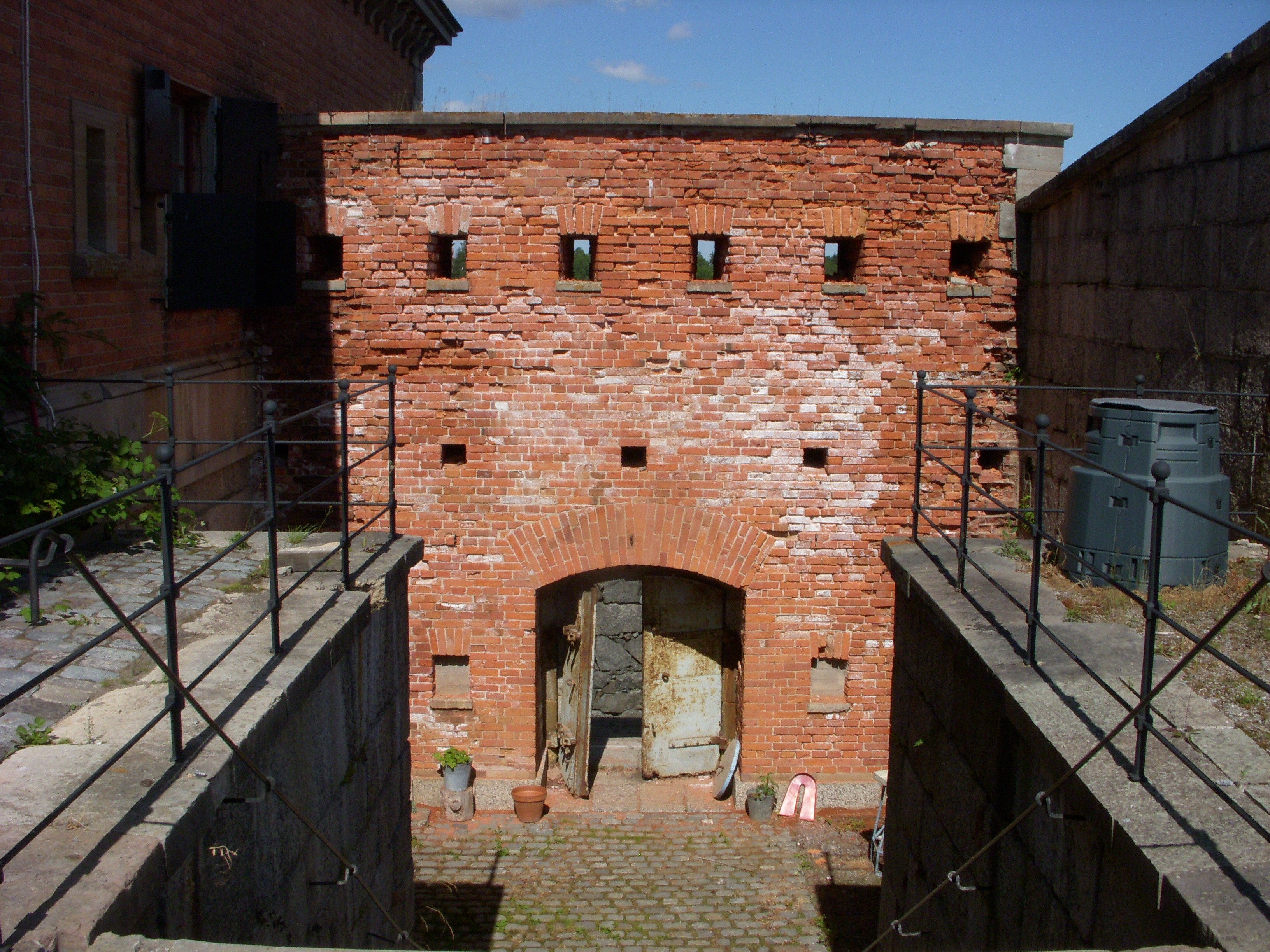 Rindö redutt, trappa och portal till vallgraven